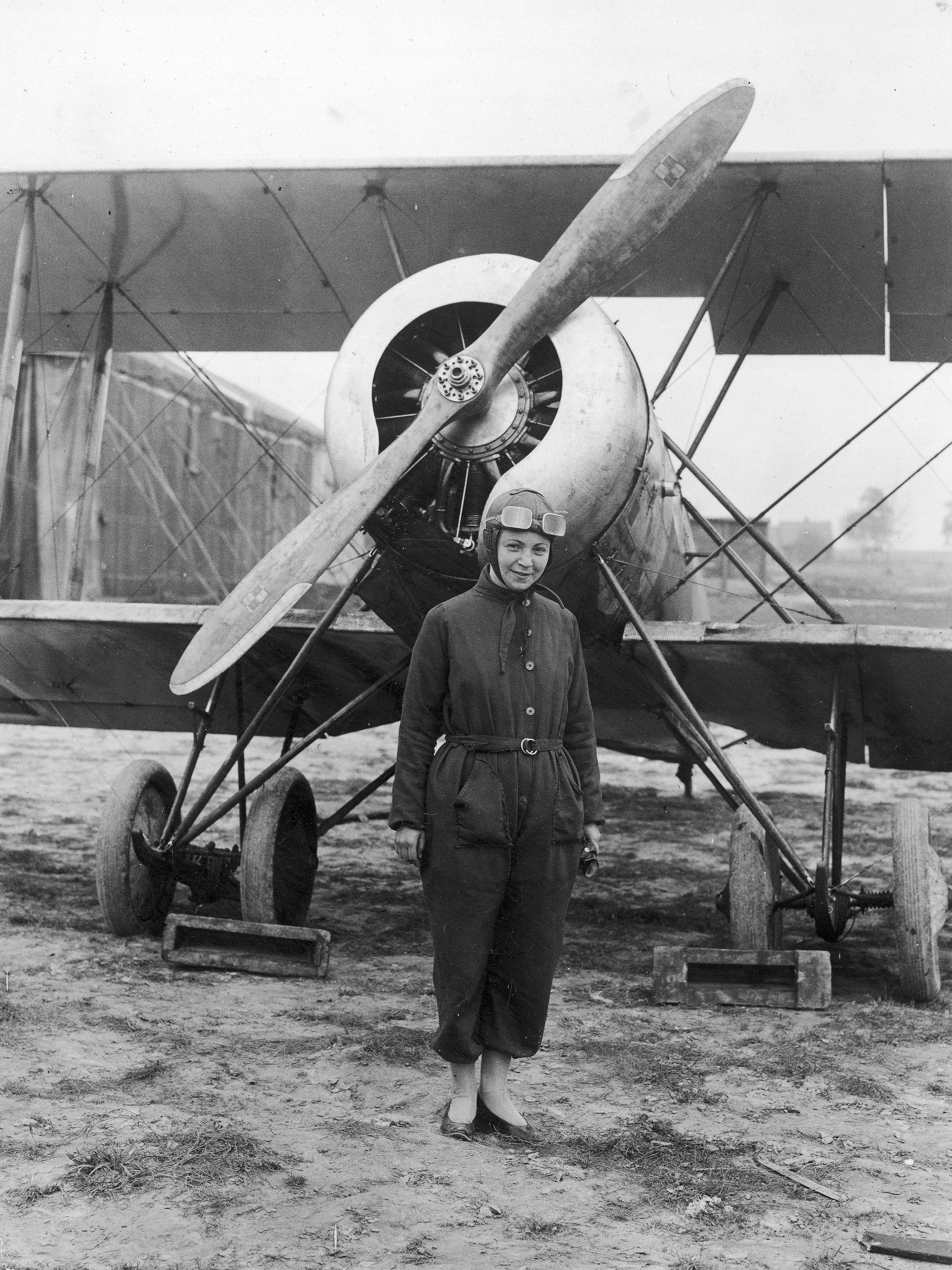 Karolina Iwaszkiewiczówna pilot Aeroklubu Krakowskiego, pierwsza polska kobieta pilot, przed samolotem "Sokół". Koncern Ilustrowany Kurier Codzienny - Archiwum Ilustracji. Sygnatura: 1-S-1097-1